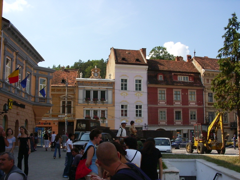 the former Flachzeile (Şirul Inului, Lensor) in Braşov (Kronstadt, Brassó), Romania